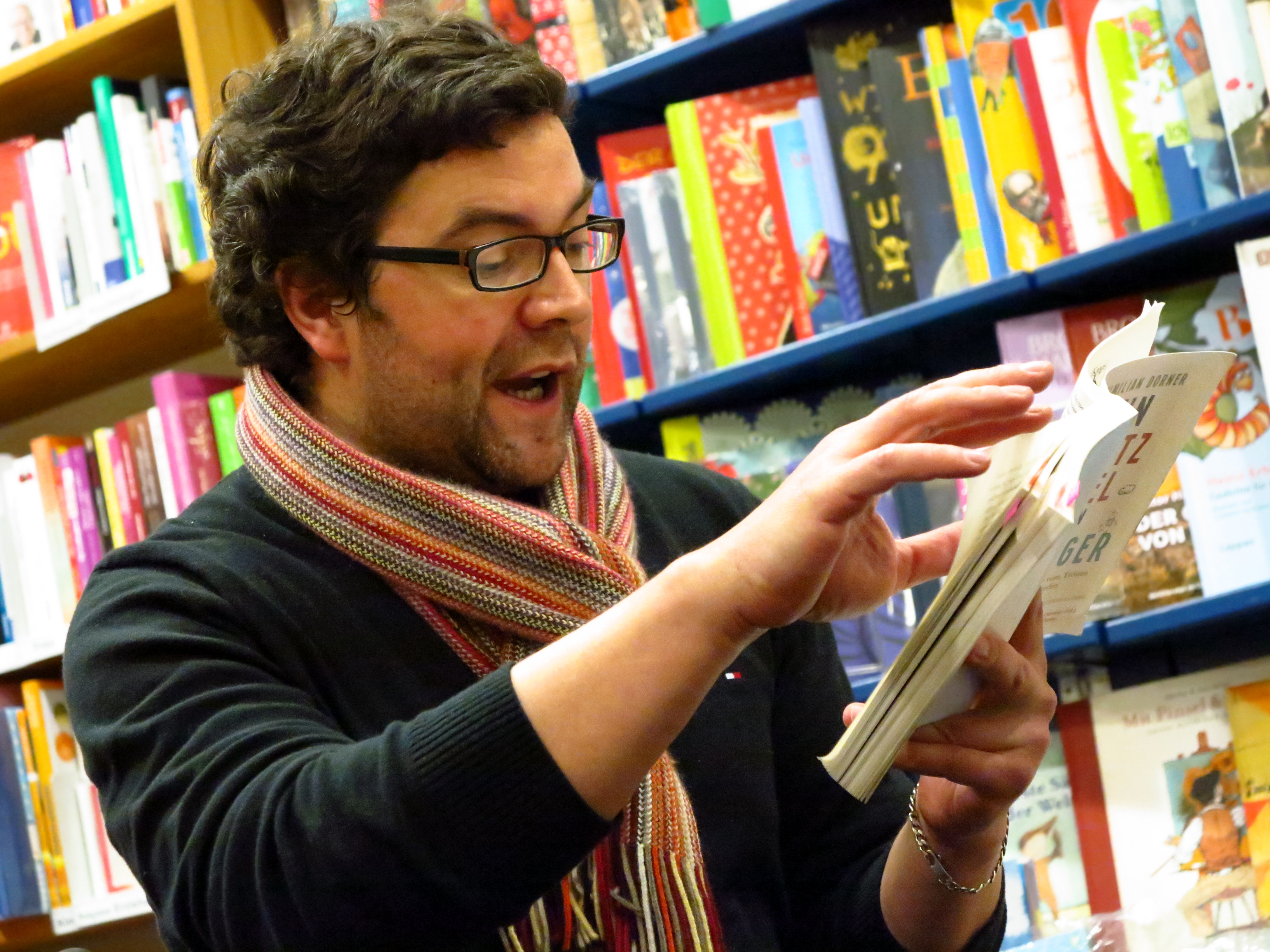 Der Schriftsteller Max Dorner liest aus seinem Werk "Mein Schutzengel ist ein Anfänger" in einer Grafinger Buchhandlung im November 2012